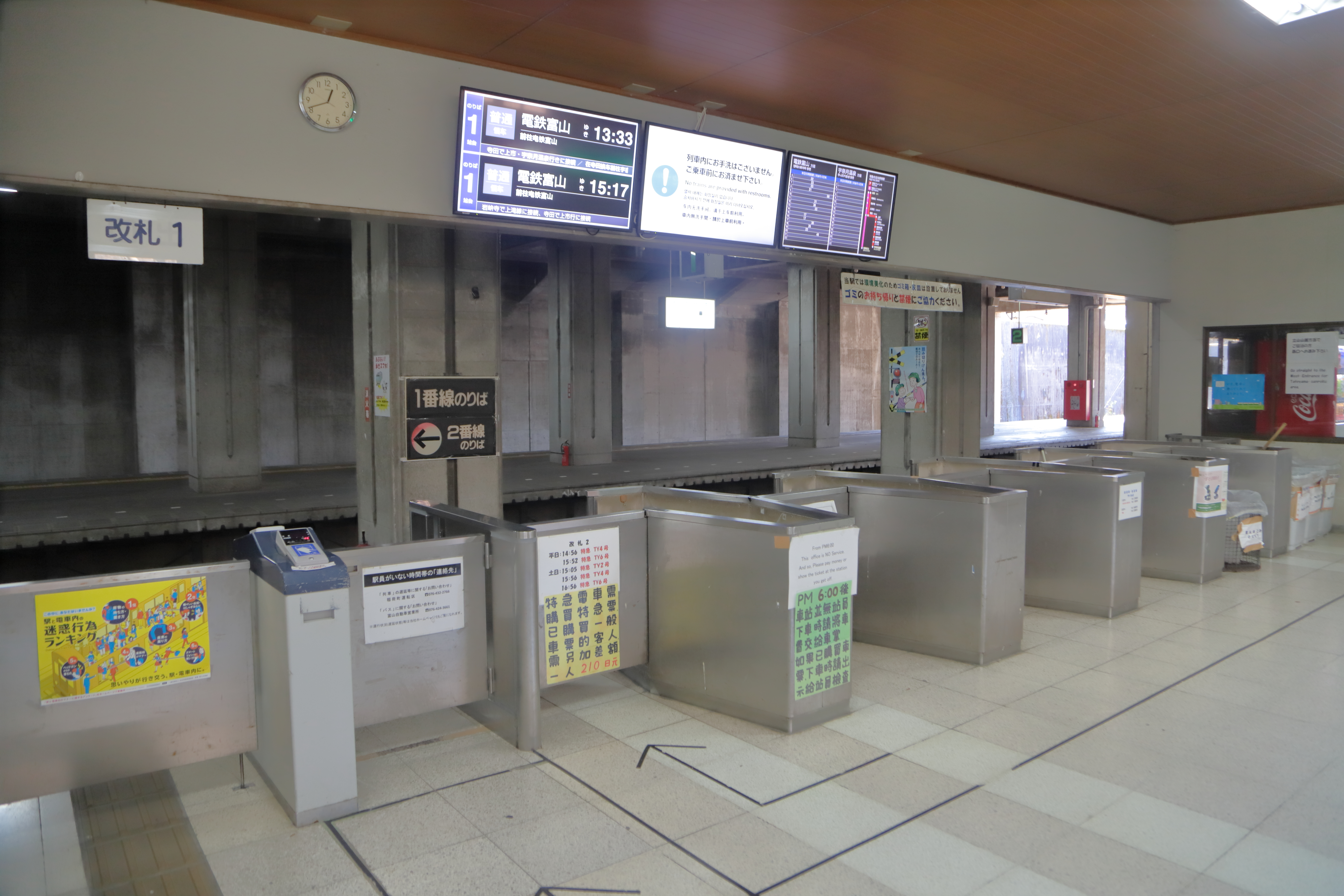 富山地方鉄道立山駅。2019年12月9日撮影